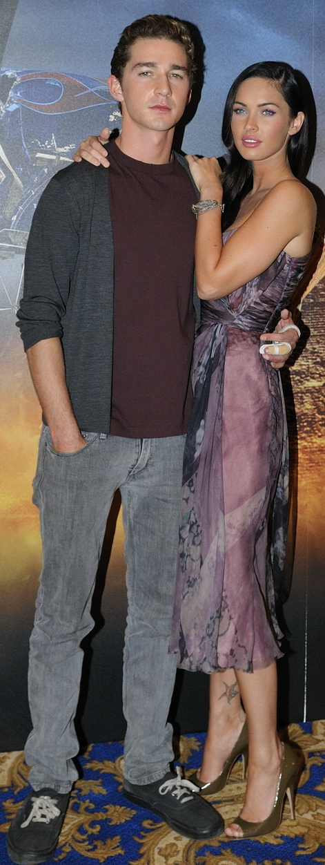 Megan Fox et Shia Labeouf au Georges V à Paris, pour la promo du film Transformers 2 : la revanche